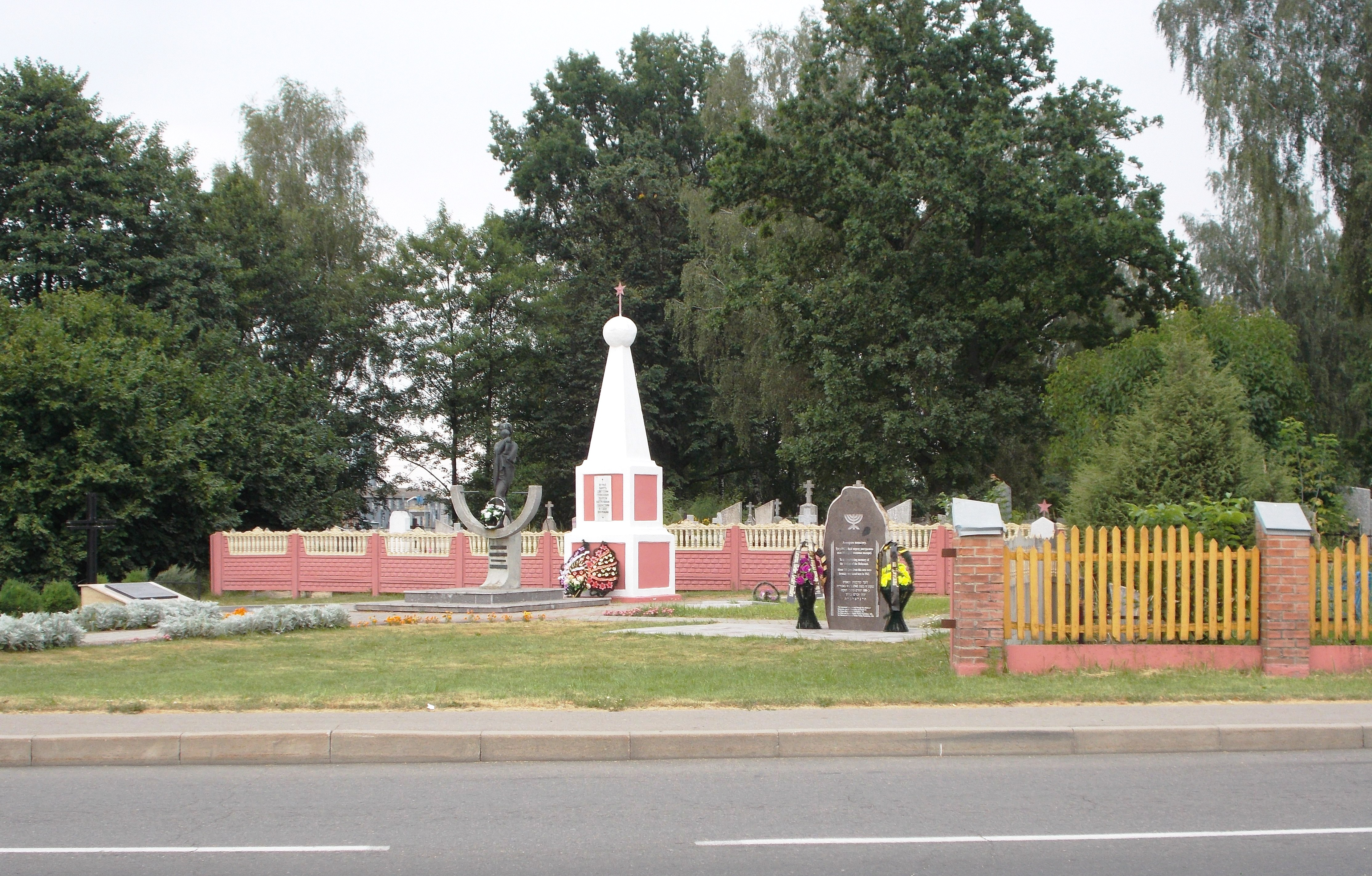 Памятник около 100 убитым нацистами и их прислужниками на этом месте в 1942 году евреям - узникам гетто в Жабинке (Брестская область). Находится в Жабинке у кладбища недалеко от дома № 1 по улице Мира.